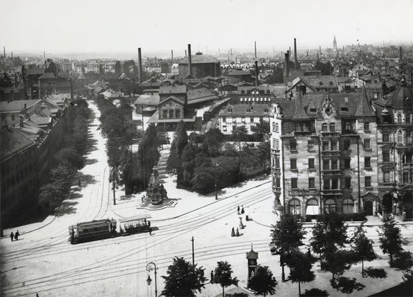 Plärrer in Nürnberg. Links die Rothenburger Straße, Mittig der Ludwigsbahnhof mit einem Zug der Ludwigsbahn (heute: Südliche Fürther Straße), Rechts die Fürther Straße. Vorne eine Straßenbahn und das Ludwig-Eisenbahn-Denkmal